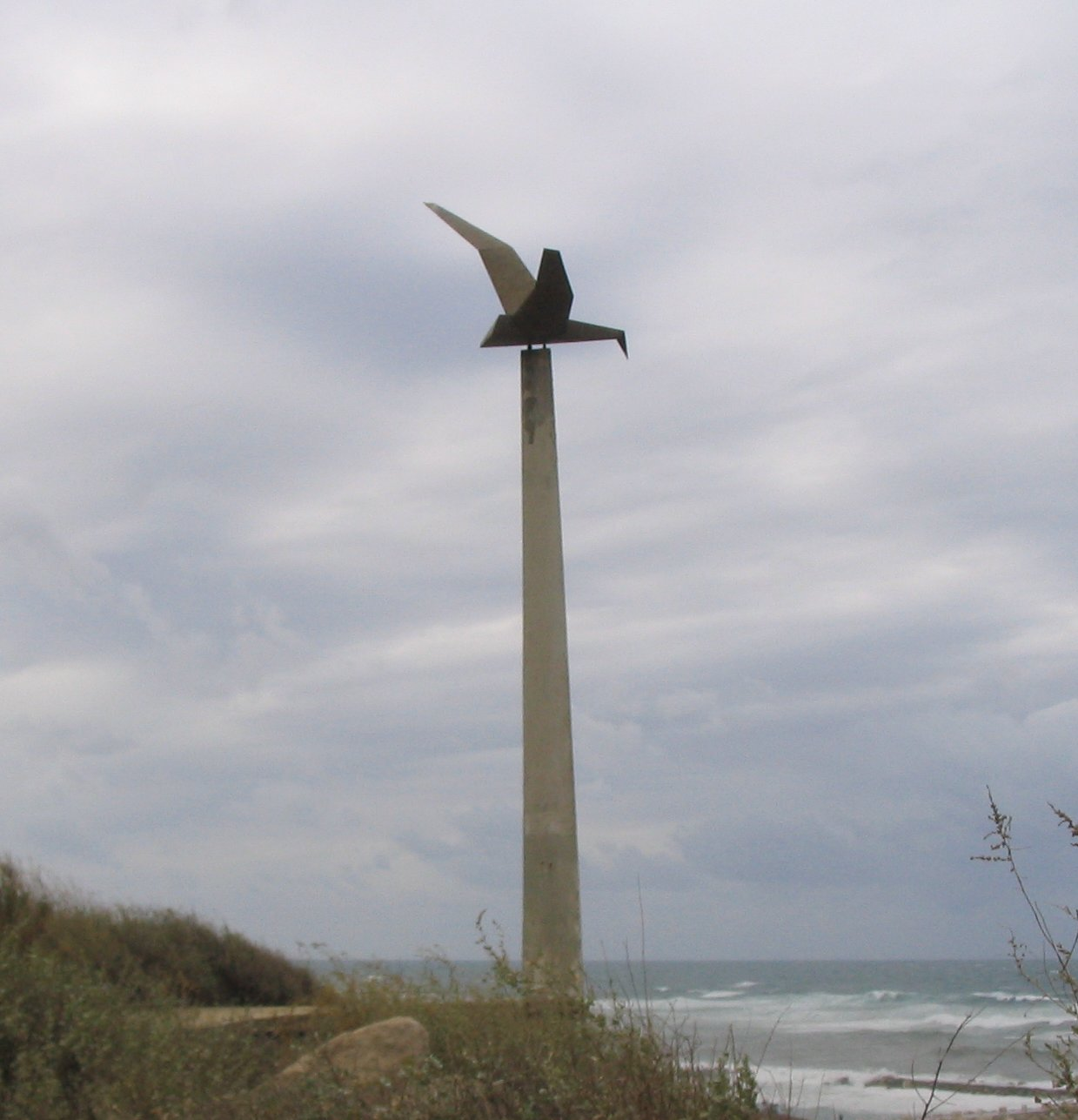 אנדרטה לזכר טייסי חיל האוויר שנפלו בפעולה מול חוף תל אביב, ,1948